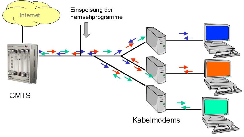 Kabel internetzugang